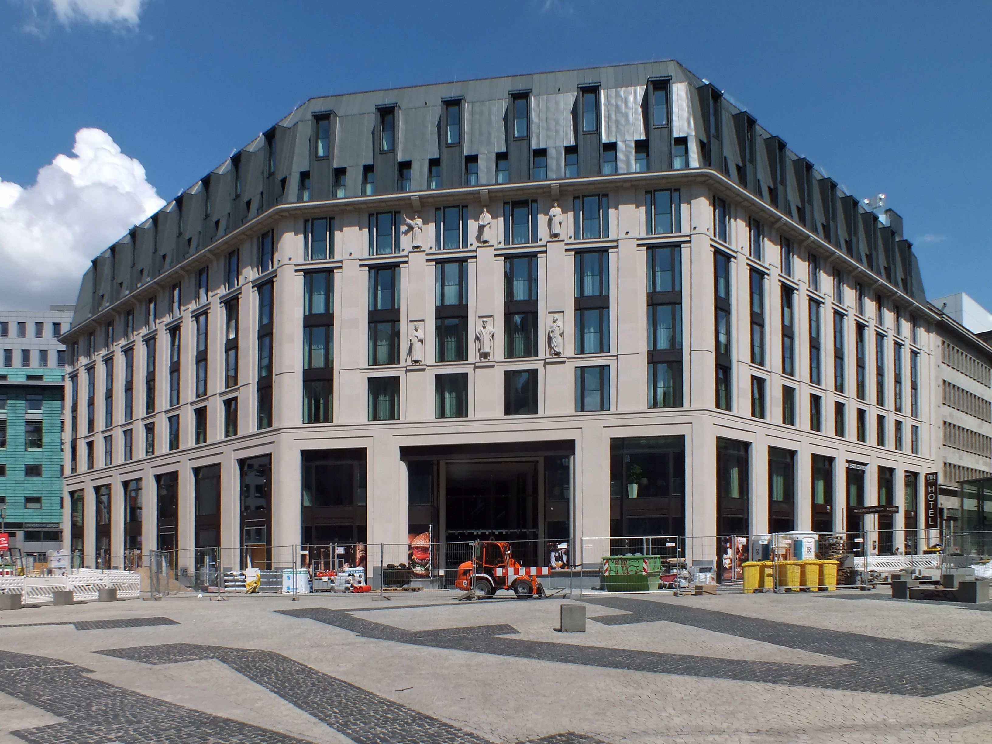 Neubau Burgplatz-Passage am Burgplatz in Leipzig